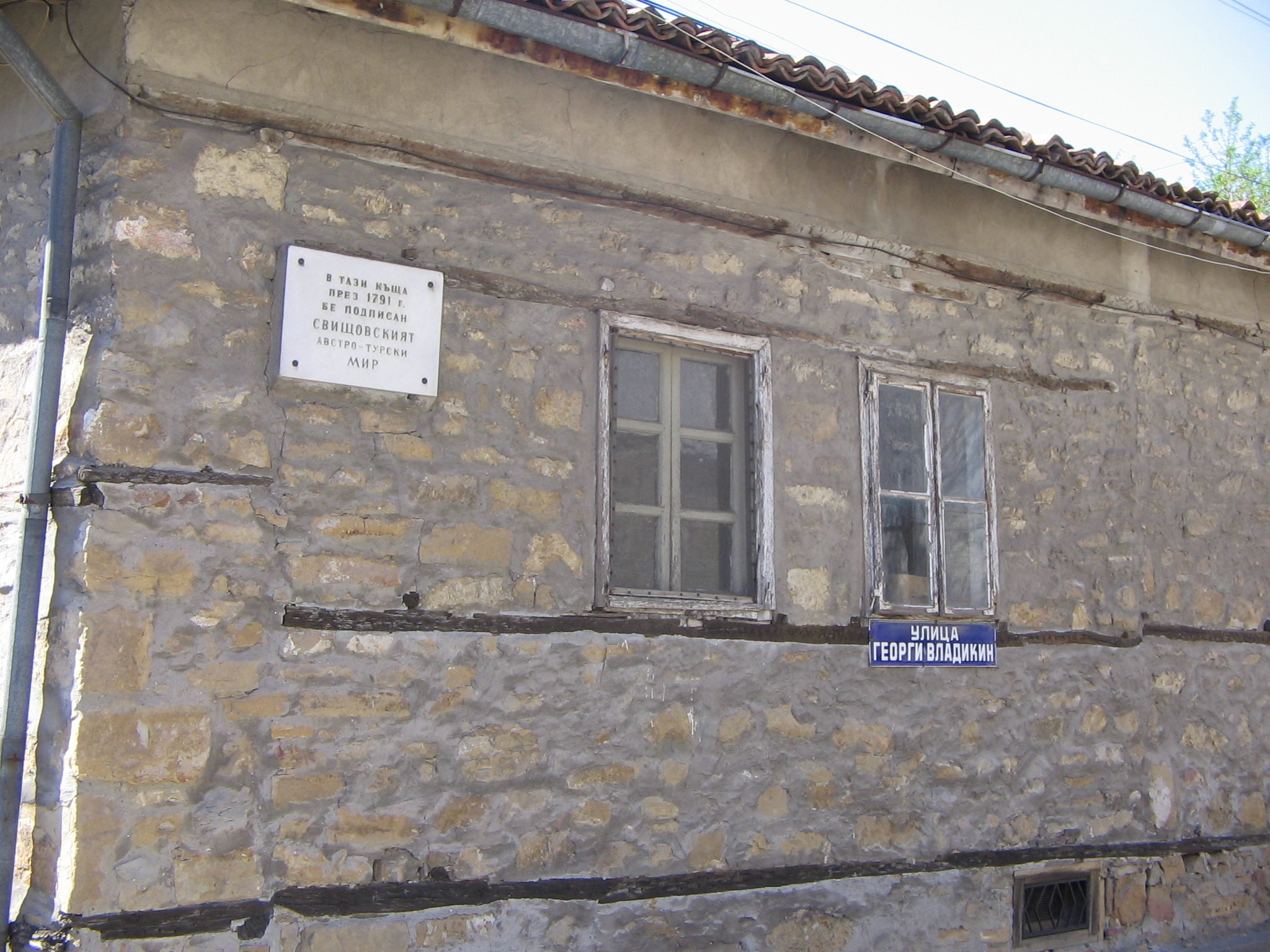 Къщата, в която е подписан Австро-Турският мир, град Свищов, България